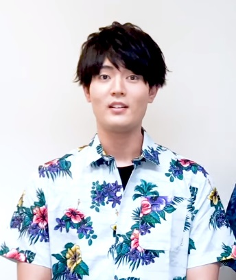 駒田航（声優）ヒプノシスマイク 入間銃兎役